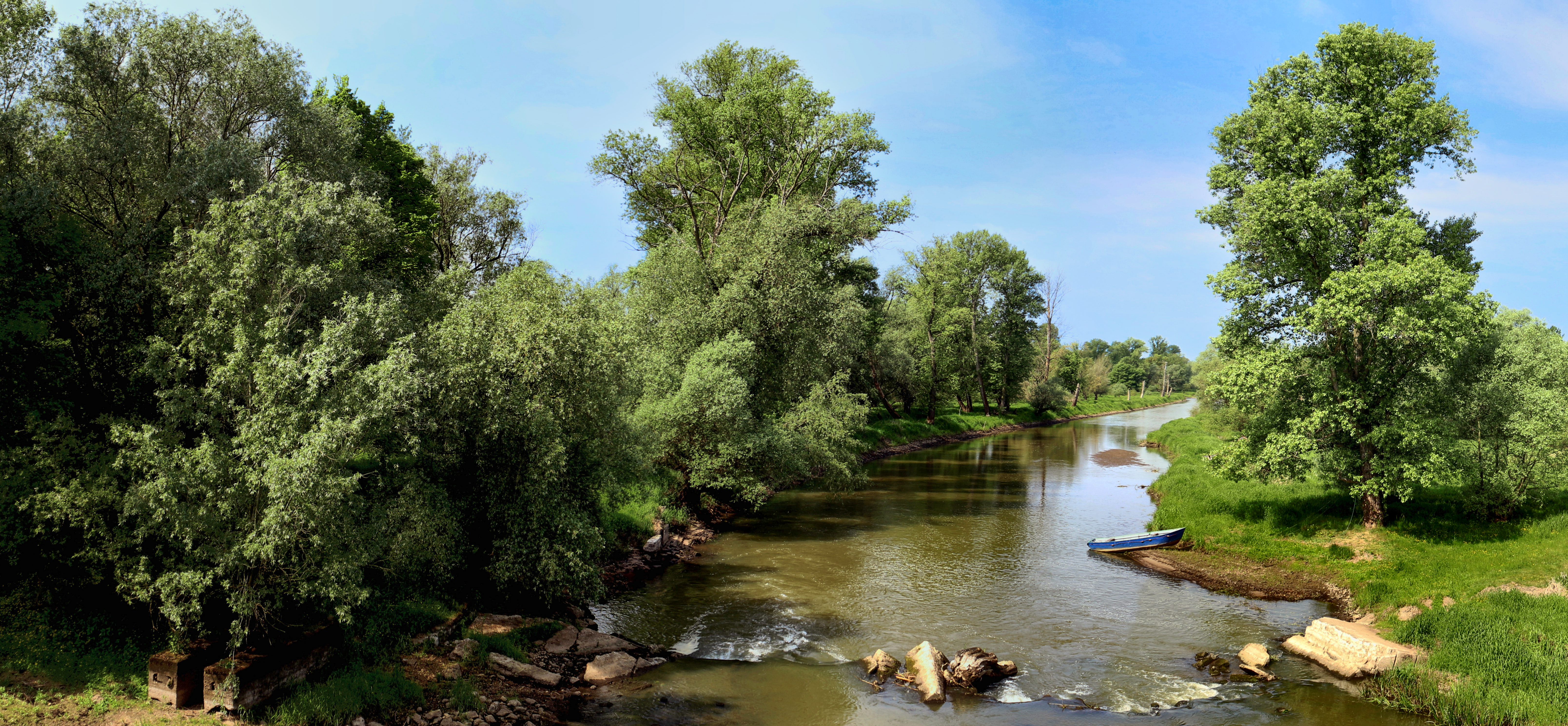 Obszar specjalnej ochrony ptaków Łęgi Odrzańskie. Wyszanów, ujście Baryczy do Odry. This is a photography of Natura 2000 protected area with ID PLB020008